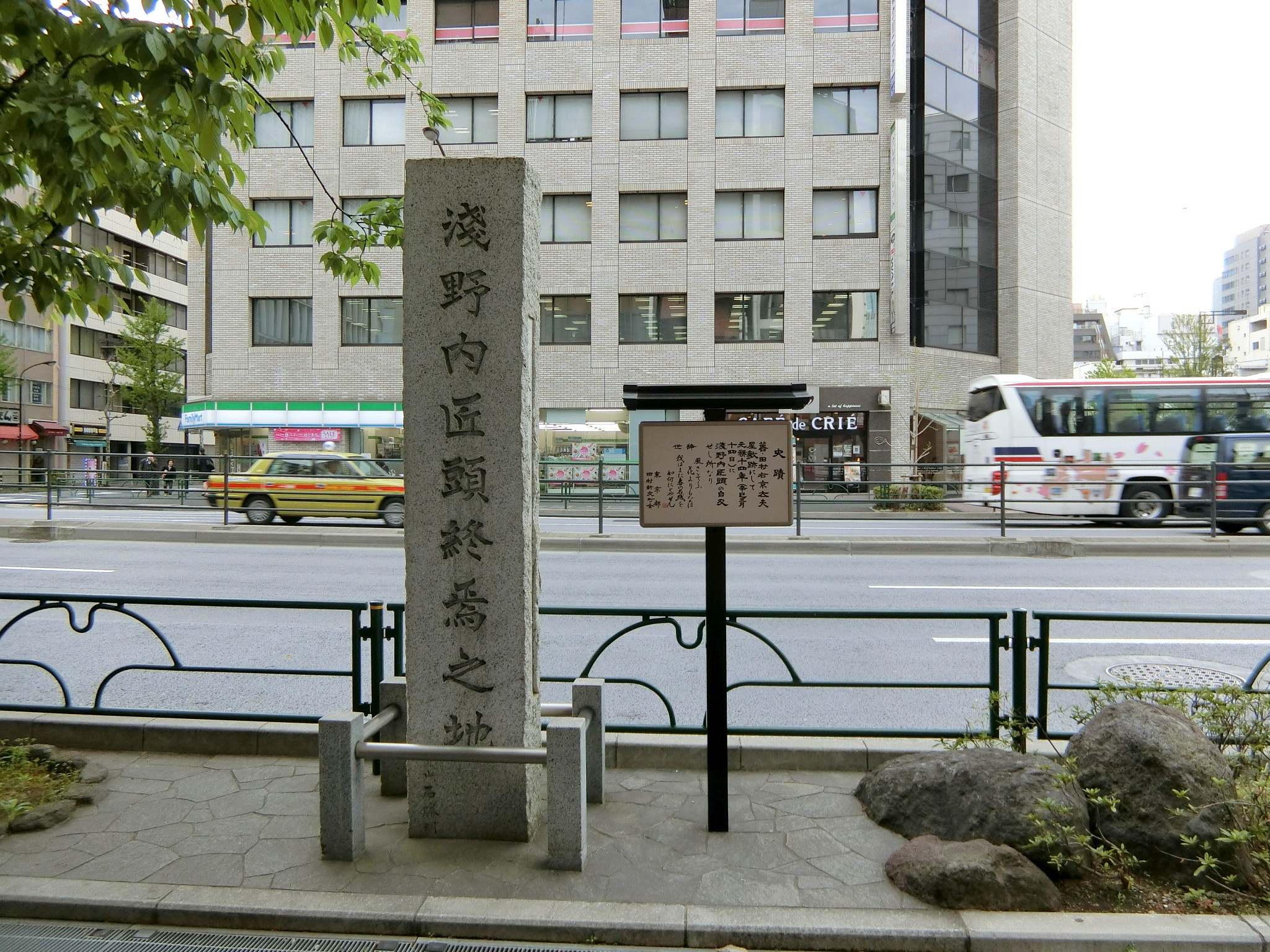 浅野内匠頭終焉の地、東京都内でお怒りヘンリー8世 (talk)が04:44, 1 June 2019 (UTC)に撮影